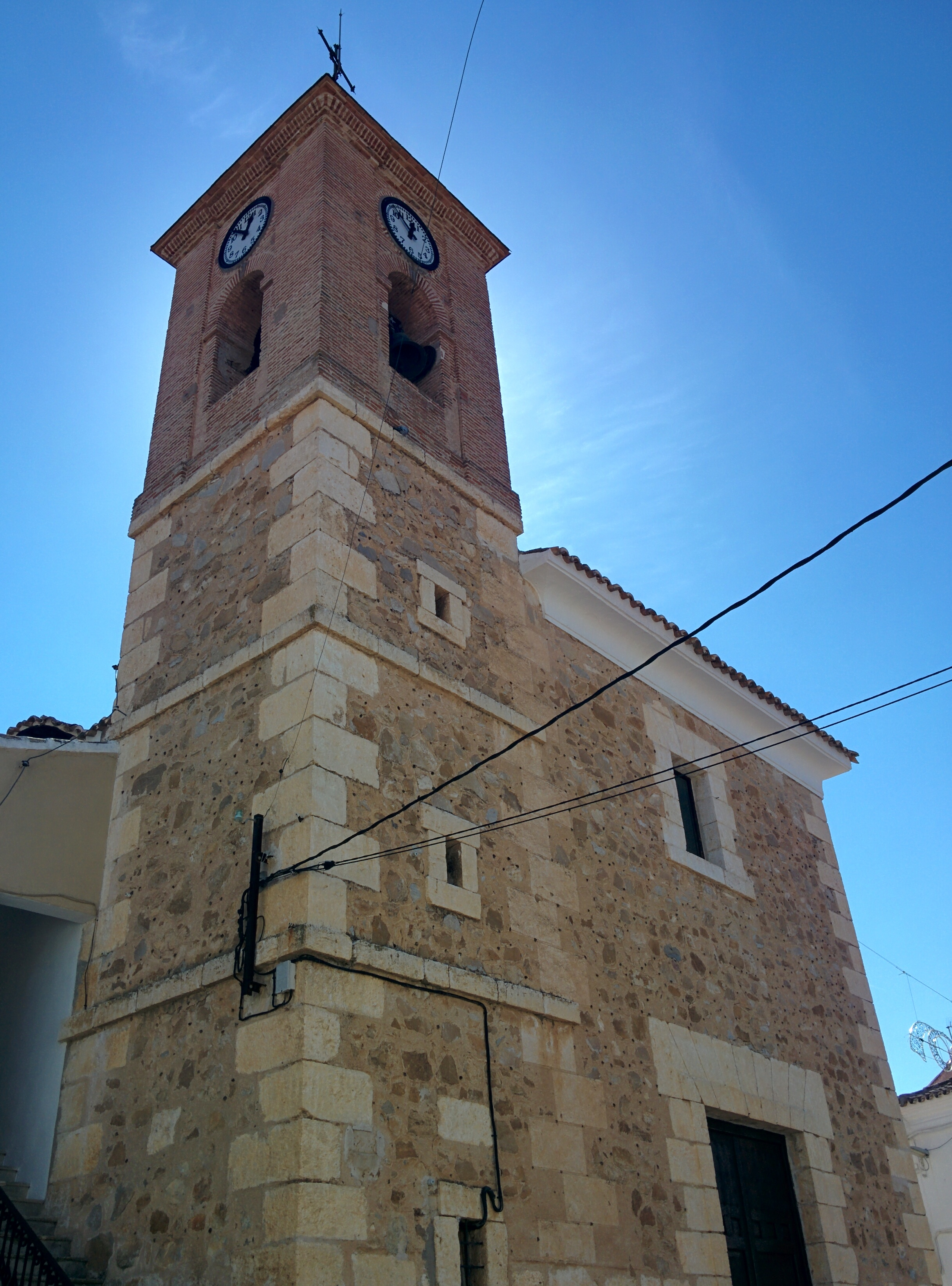 Iglesia de Santa Ana, Villanueva de Bogas (Toledo, España).